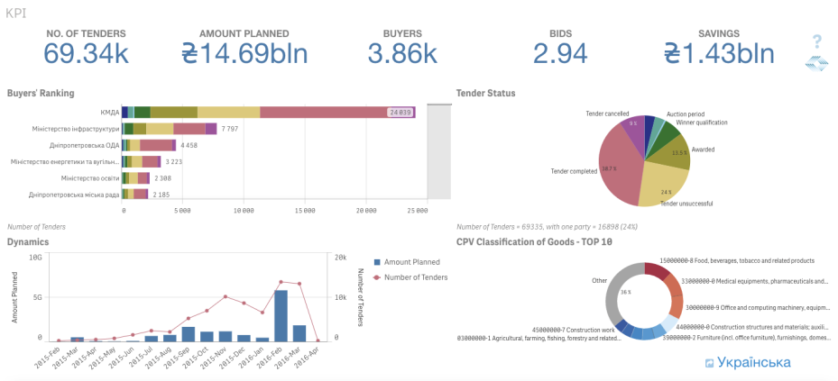 Analitical module BI